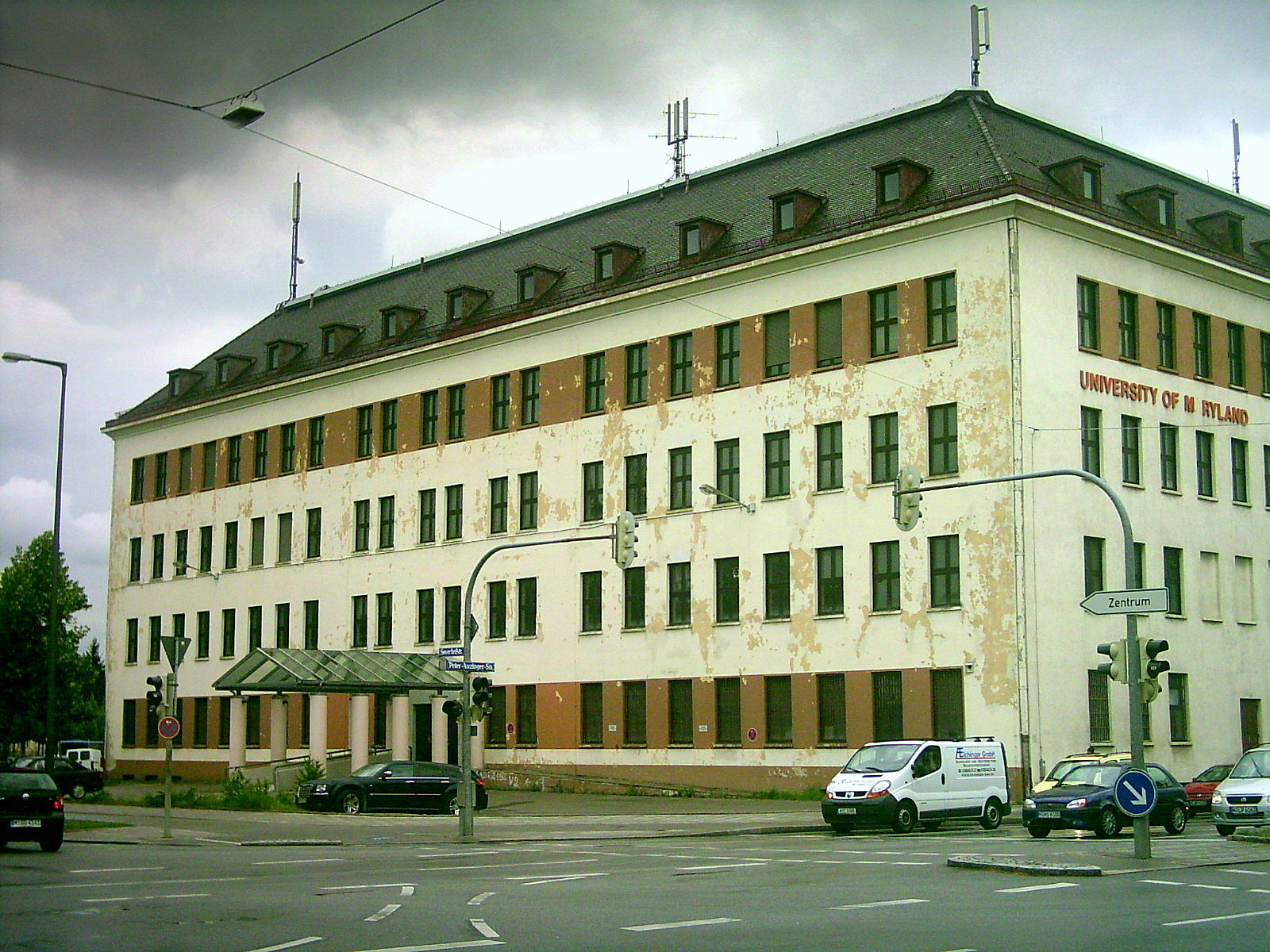 ehememalige McGraw-Kaserne München-Giesing PX / University Of Maryland